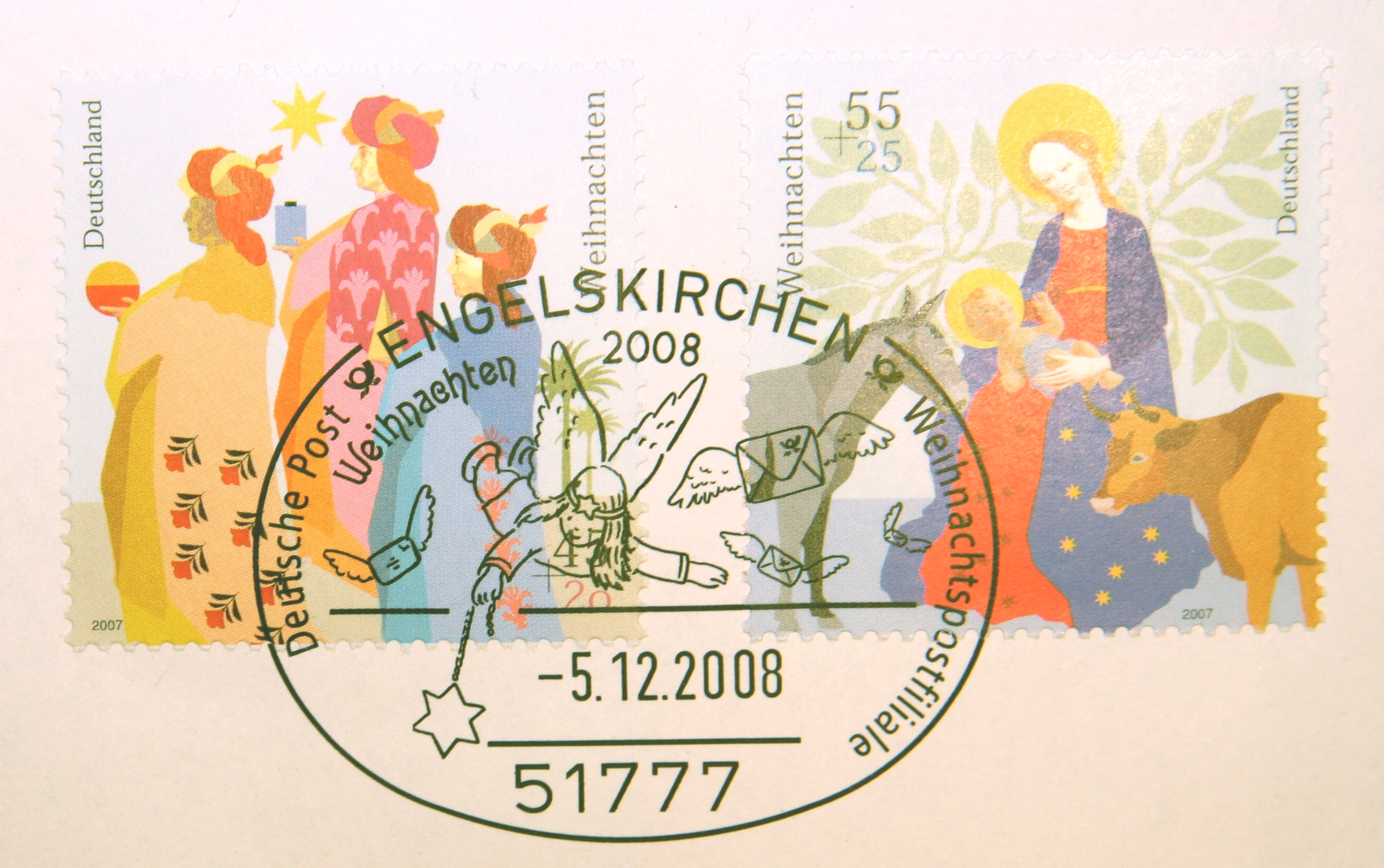 Stempel des Weihnachtspostamts in Engelskirchen